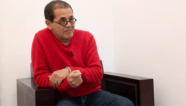 pictures